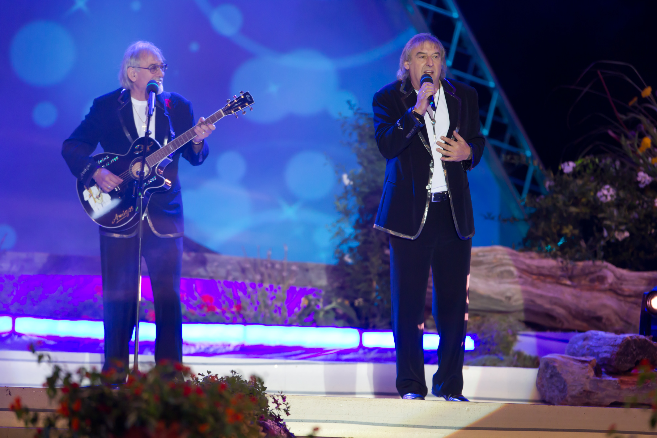 Wenn die Musi spielt - Sommer Open Air